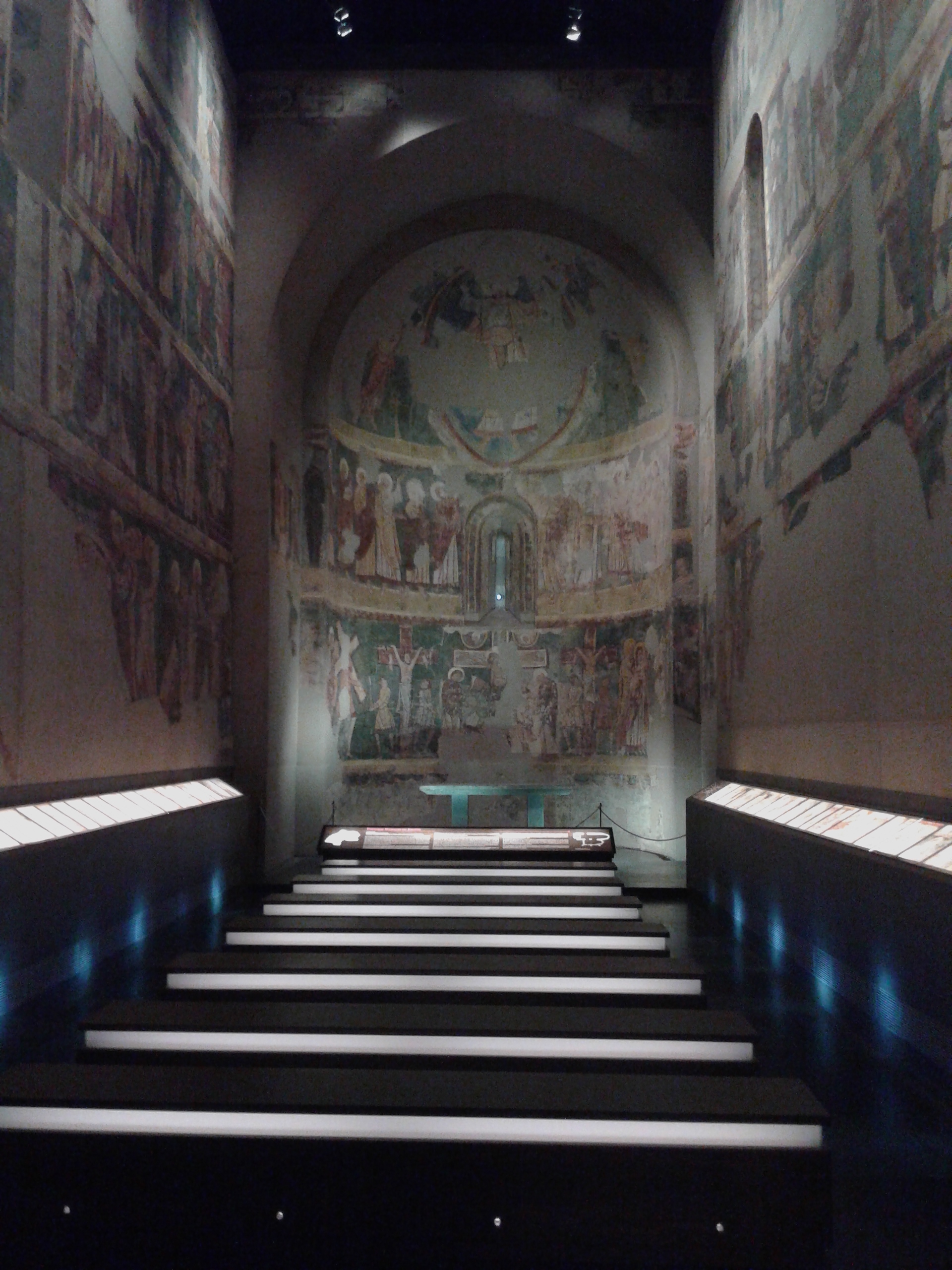 Pintura mural de la iglesia de san Julian y santa Basilea de Bagües (Zaragoza, Aragón). Son las pinturas murales arrancadas de sus muros originales y colocadas en soportes de nueva creación, recreando el interior original de la iglesia